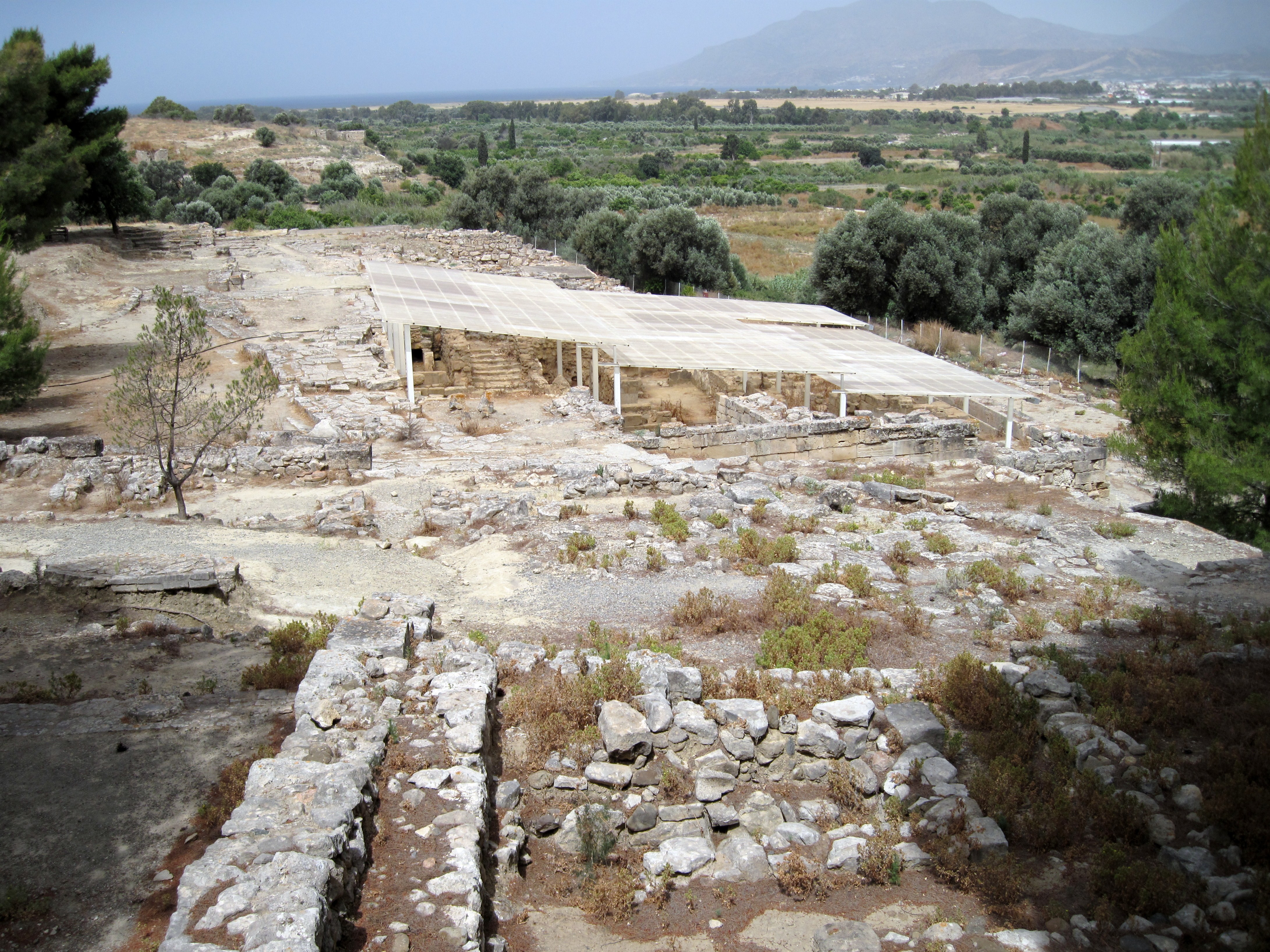 Ausgrabungsstätte von Agia Triada in der Gemeinde Festos, Regionalbezirk Iraklio, Kreta, Griechenland